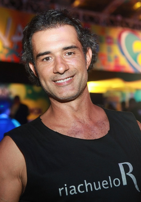 Marcos Pasquim no Carnaval de Salvador em fevereiro de 2013.